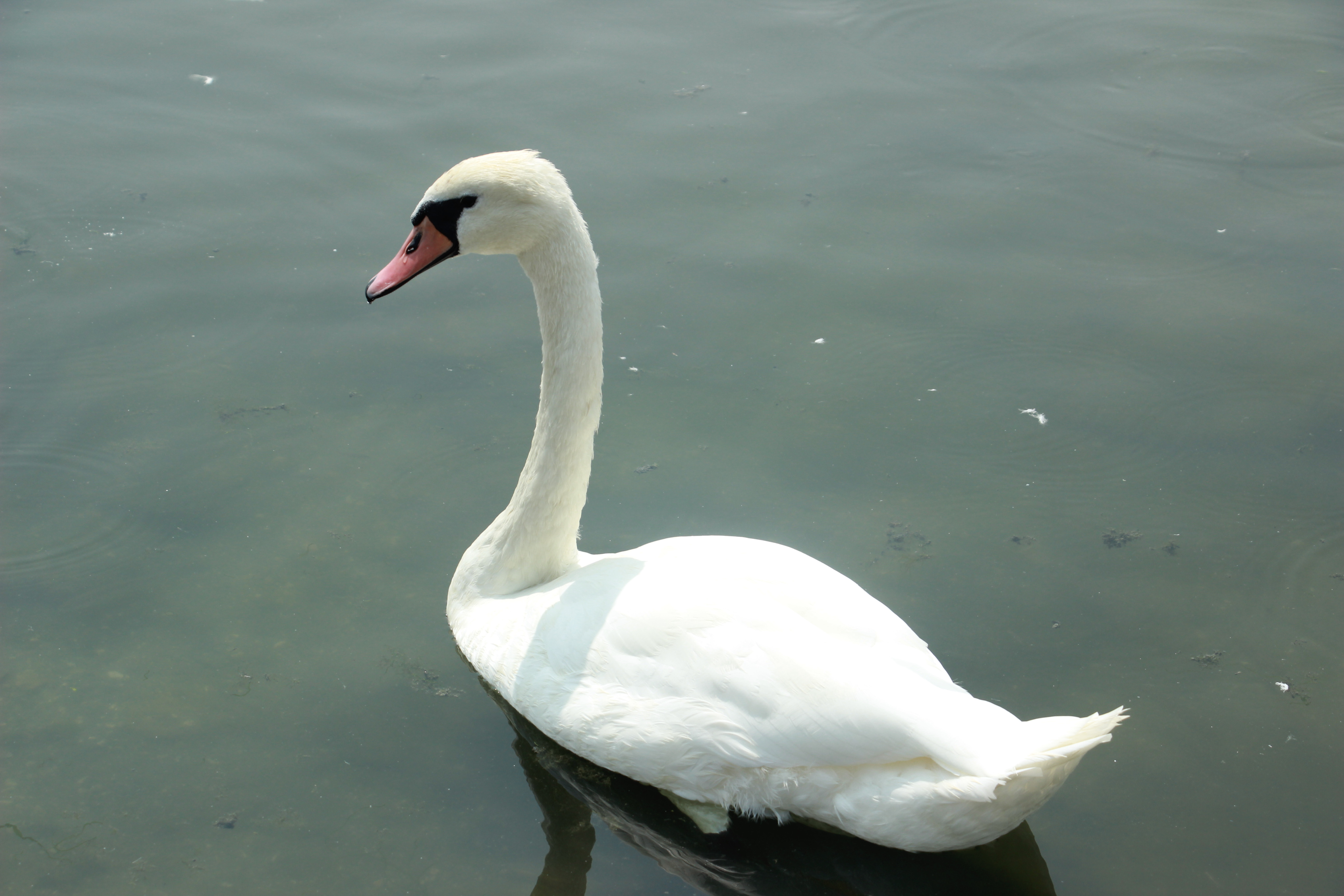 ברבור בים